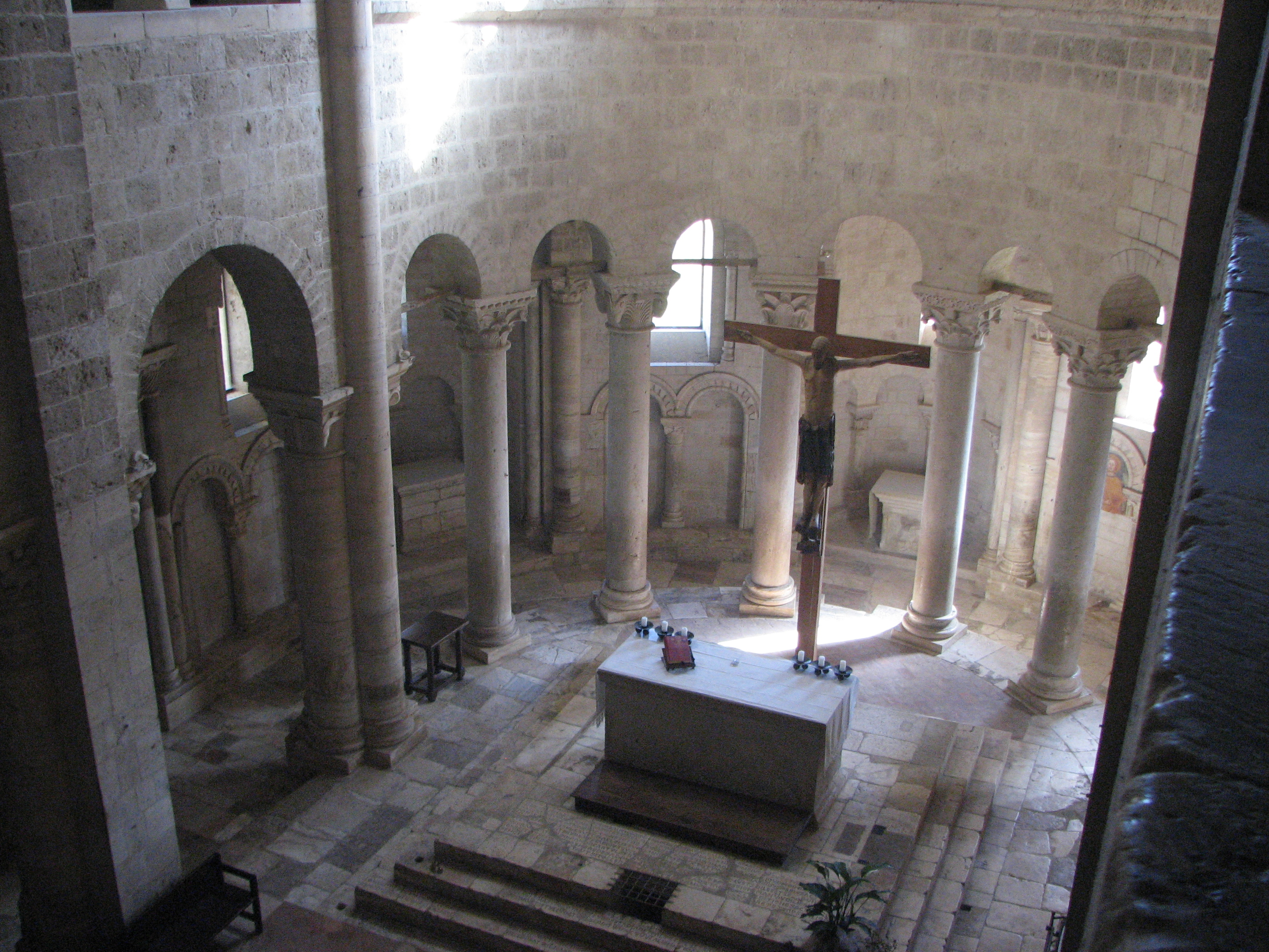 L'Abbazia di Sant'Antimo (Montalcino, Toscana, Italy) - Il presbiterio visto dal matroneo